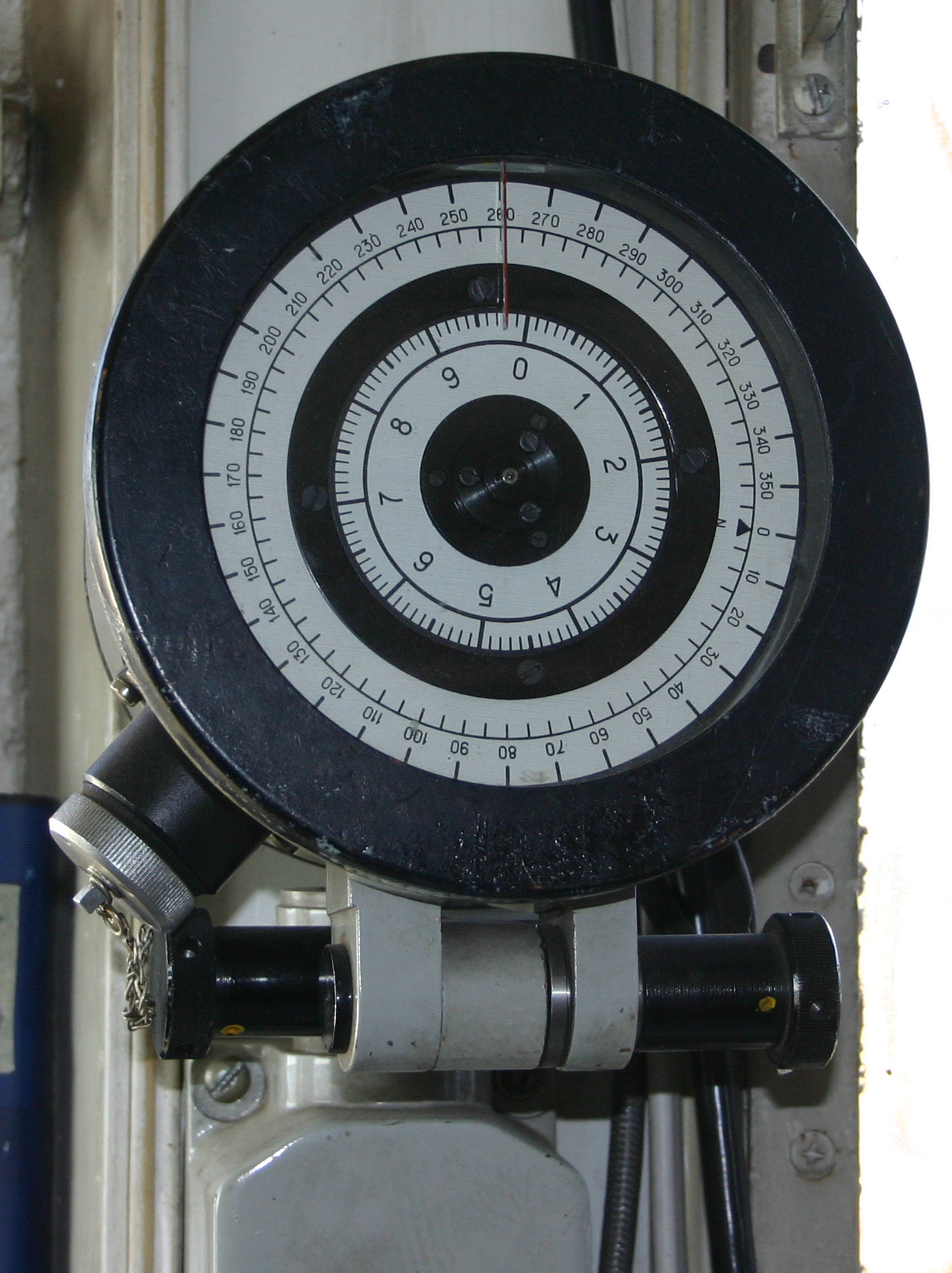 Hyrräkompassin ohjauskompassi m/s ORBIITin komentosillalla